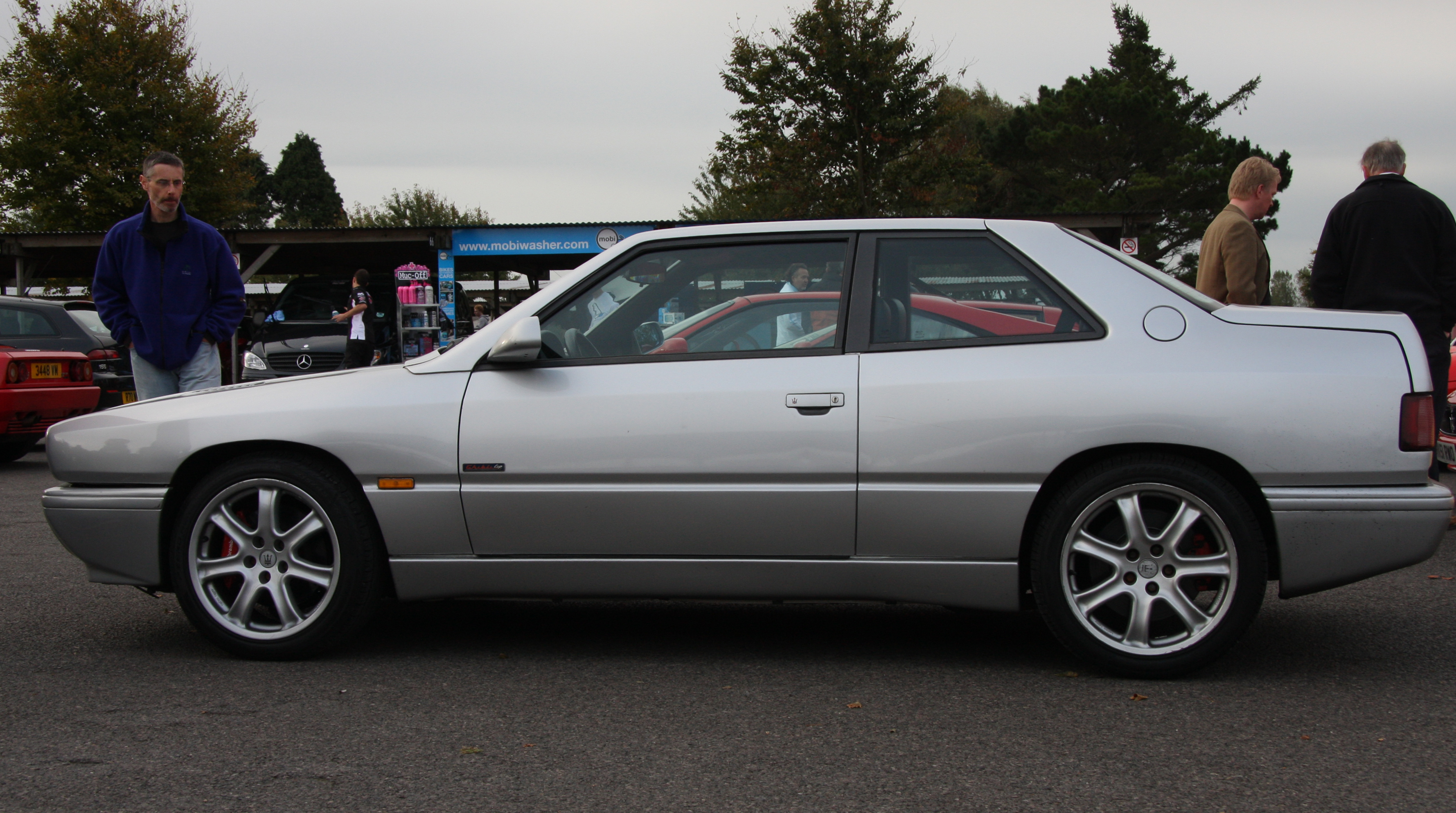 Maserati Ghibli II